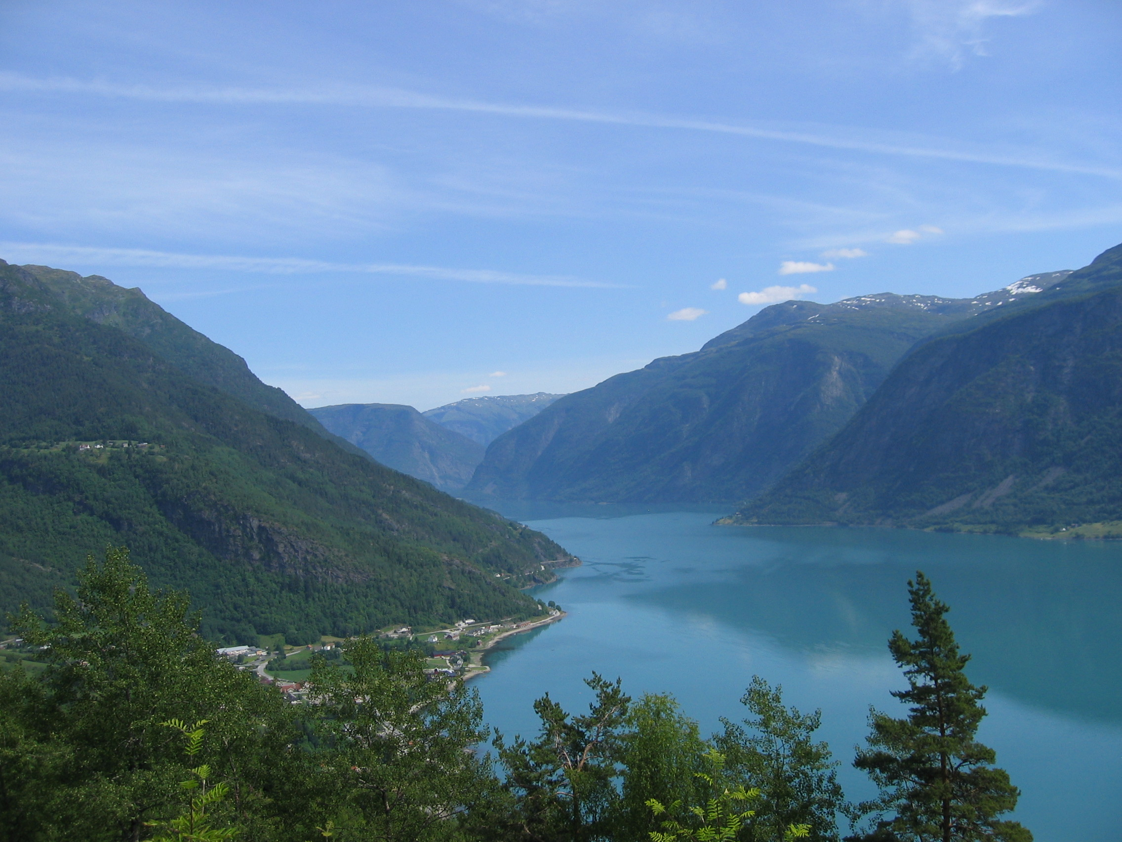 Dale ved Lustrafjorden